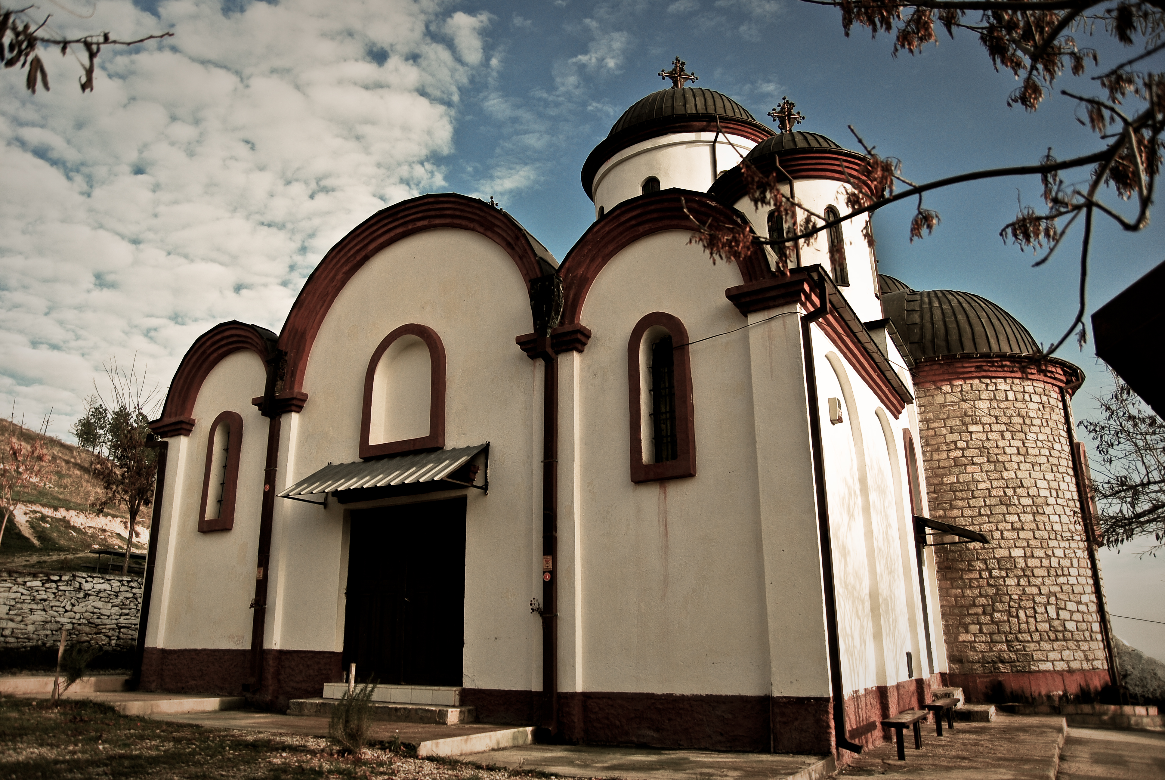 црква, Битола